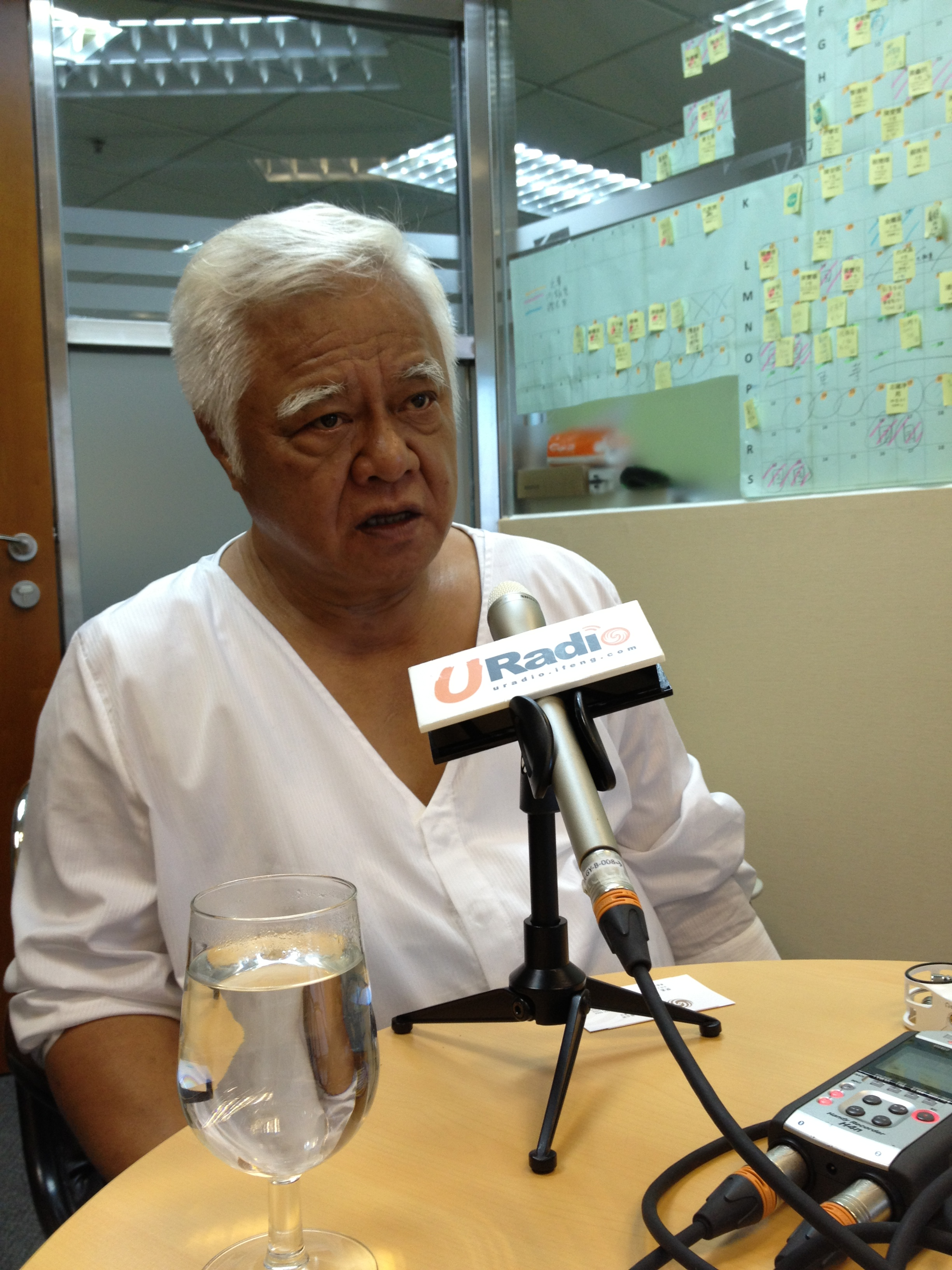 中文（中国大陆）: 胡德夫接受凤凰URadio专访。